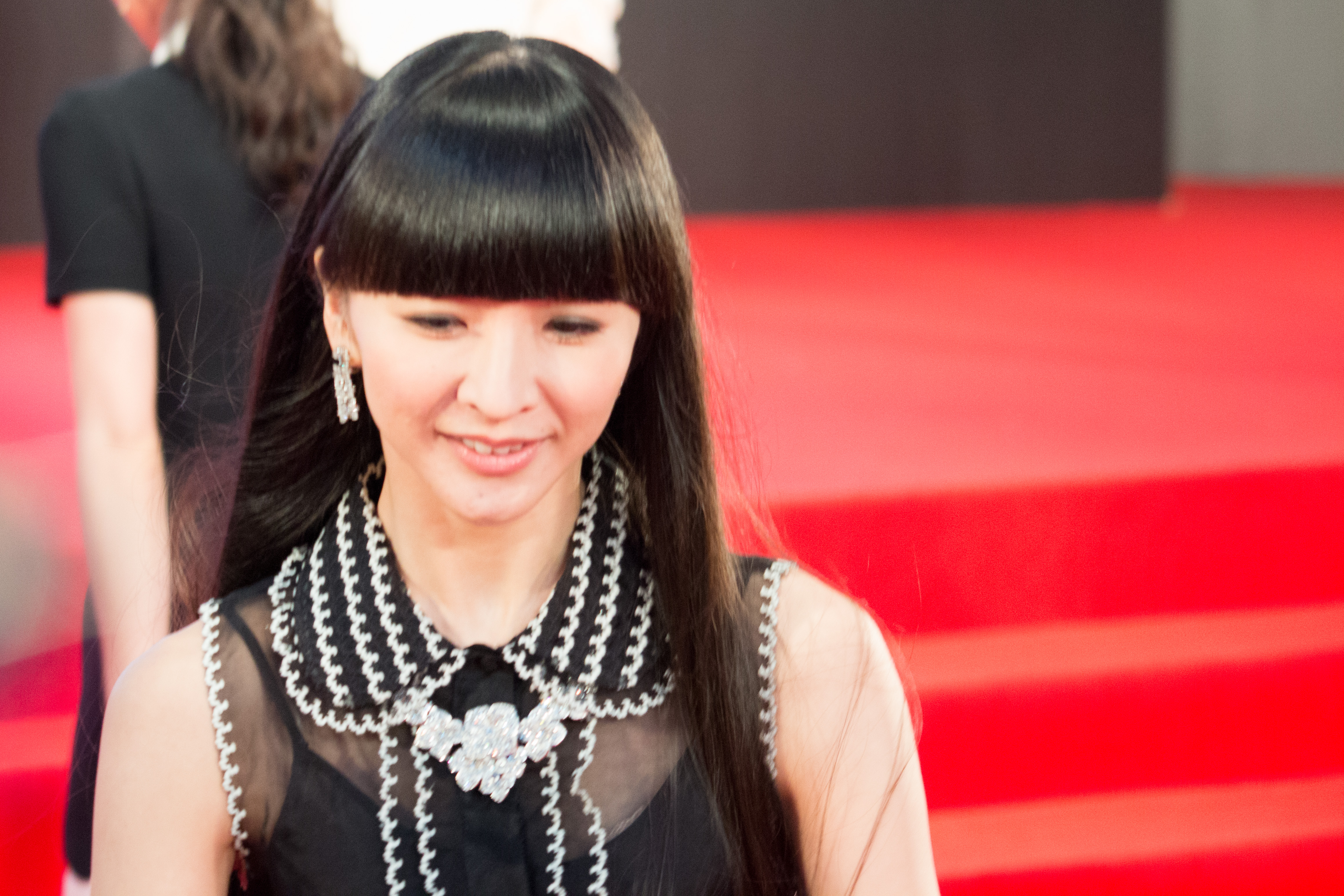 第28回 東京国際映画祭 オープニングセレモニー かしゆか (Perfume) (We Are Perfume)